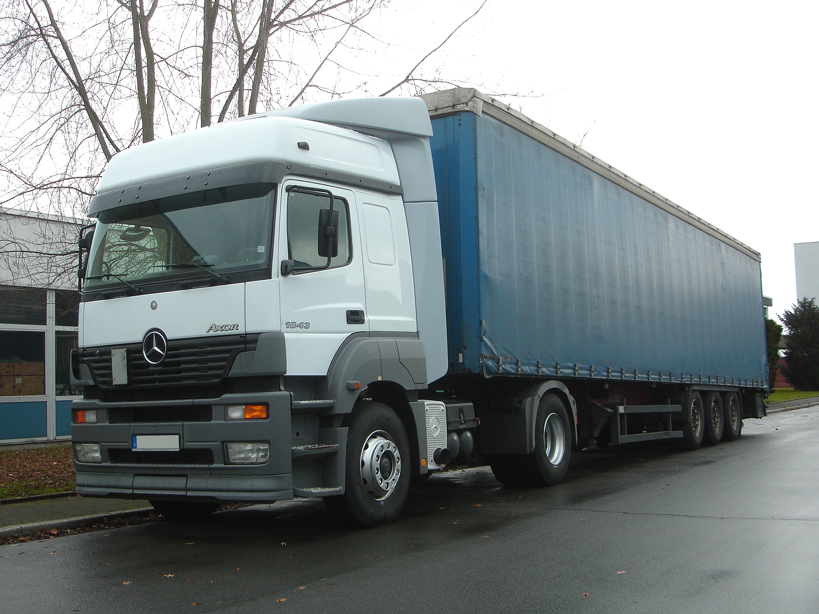 Mercedes Axor 1843 LH der ersten Bauserie als Gardinenplanensattelzug